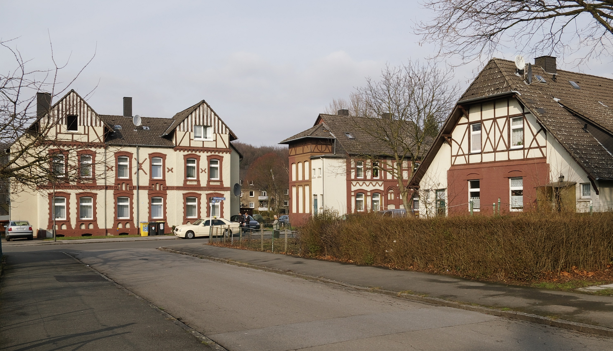 Alte Kolonie Eving, Dortmund, Nordrhein-Westfalen